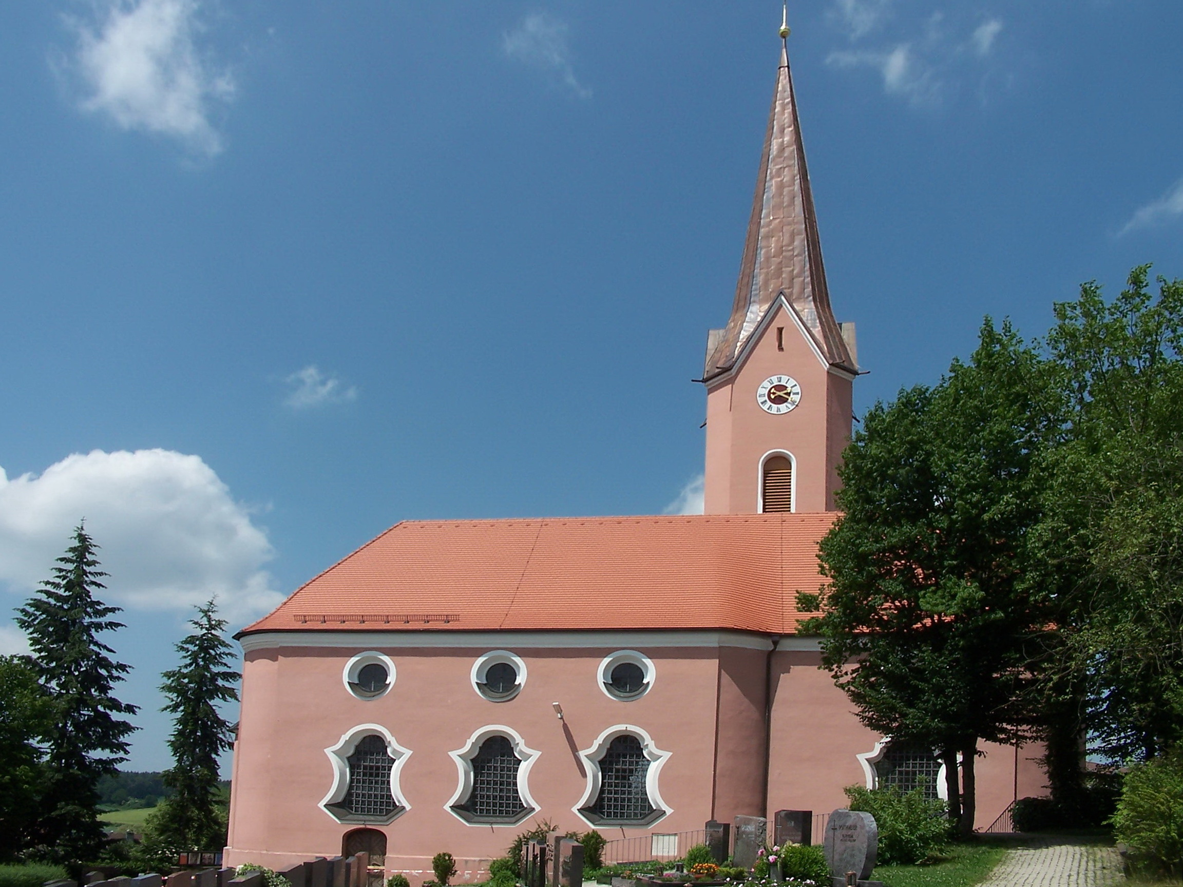 Rottenburg an der Laaber. Oberhatzkofen, Schulweg 3. Katholische Pfarrkirche Mariä Himmelfahrt. Saalkirche mit eingezogenem Chor, barocke Anlage, 1743 von Johann Georg Hirschstötter errichtet, nordseitig einbezogener Chorturm einer Vorgängerkirche aus dem Ende des 13. Jahrhunderts, Turmaufsatz barock, Spitzhelm 1880, mit Putzgliederung; mit Ausstattung. Ansicht von Süden.